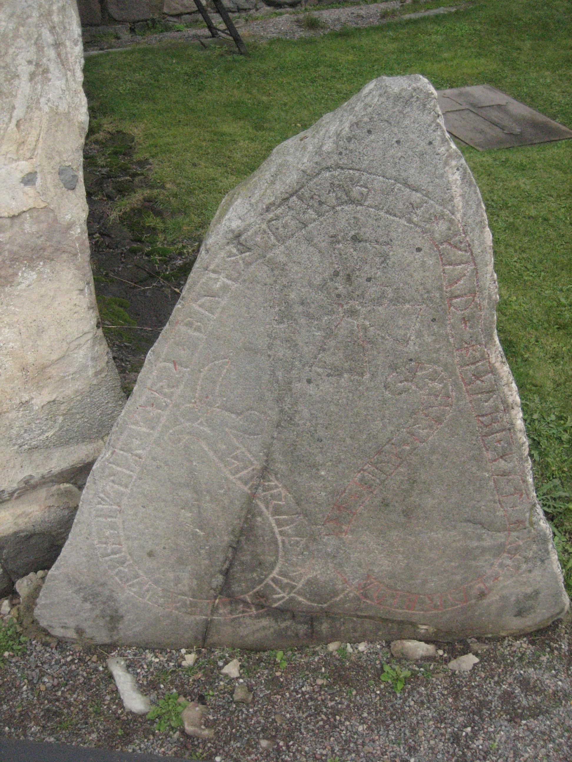 Runsten U532 utanför Roslags-Bro kyrkas vapenhus.